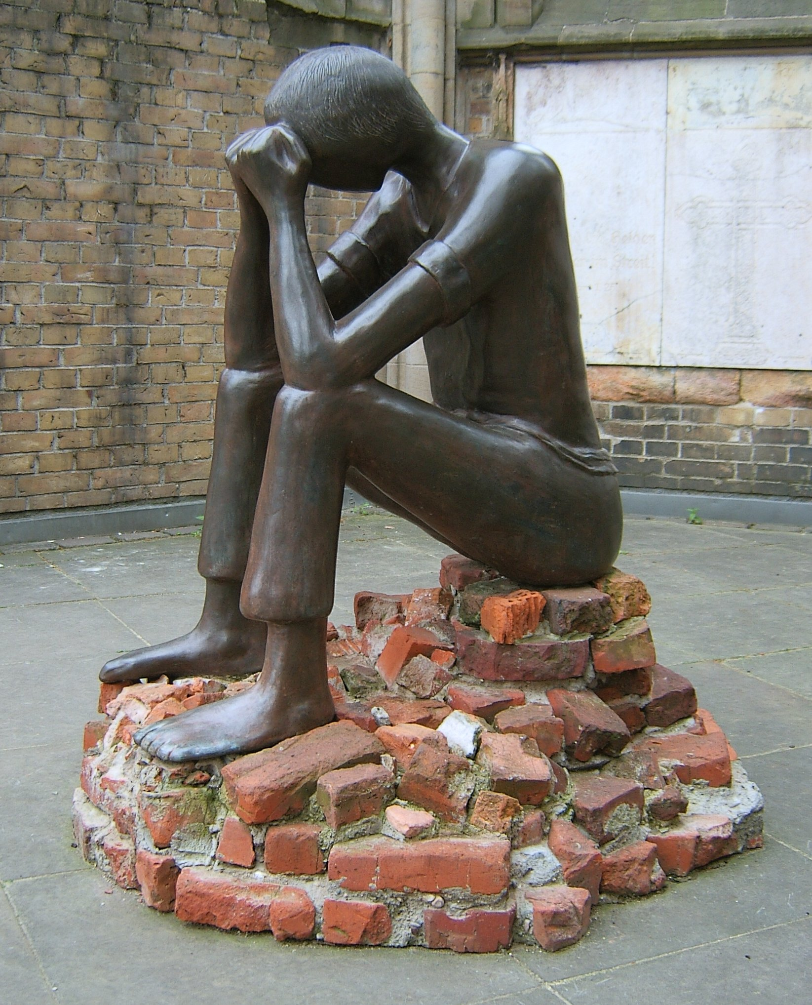 Skulptur Prüfung von Edith Breckwoldt auf dem Gelände der Ruine von St. Nikolai in Hamburg-Altstadt. Erinnerung an die KZ-Häftlinge aus dem KZ Neuengamme im Lager Sandbostel (Stalag X B).